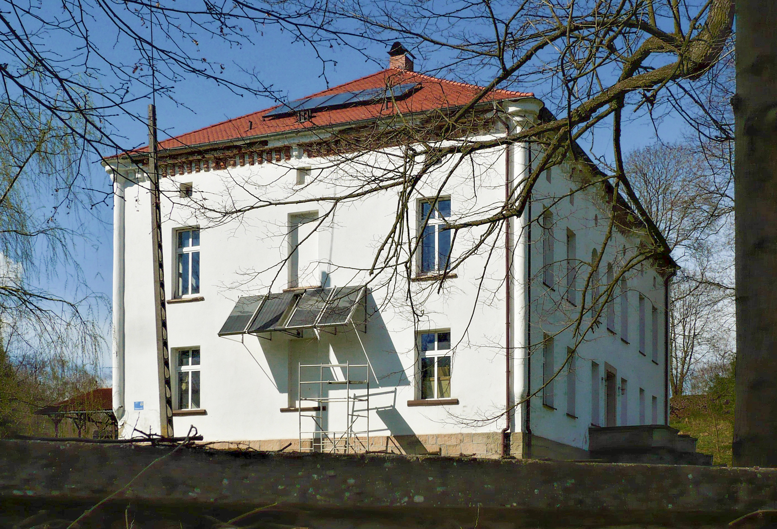 Tłumaczów. Dwór